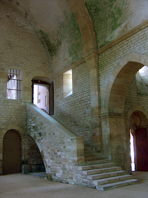 Abbaye de Fontenay .